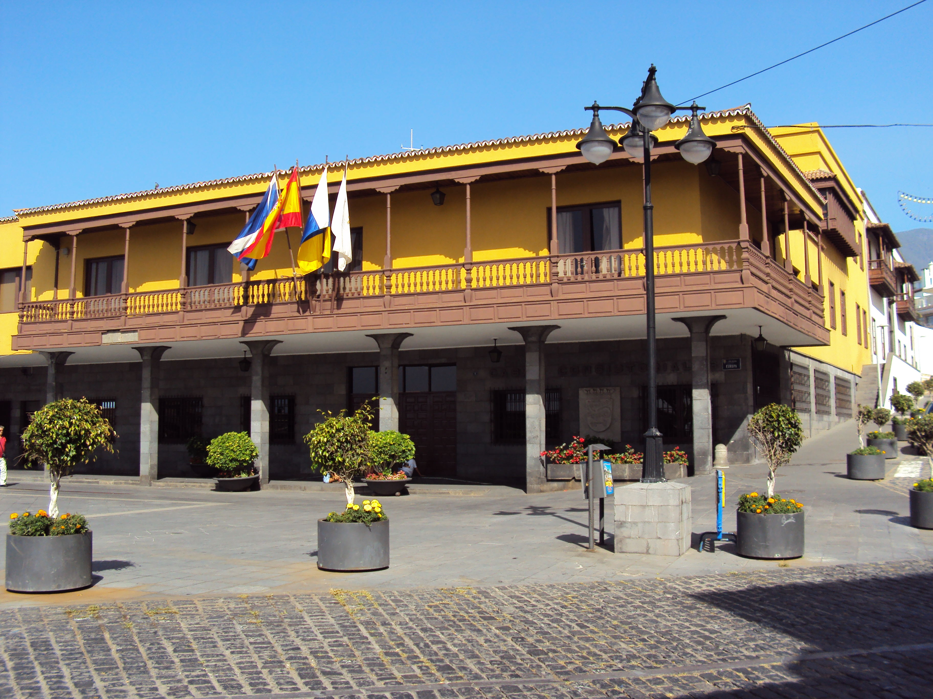 Casa Consistorial del Puerto de la Cruz